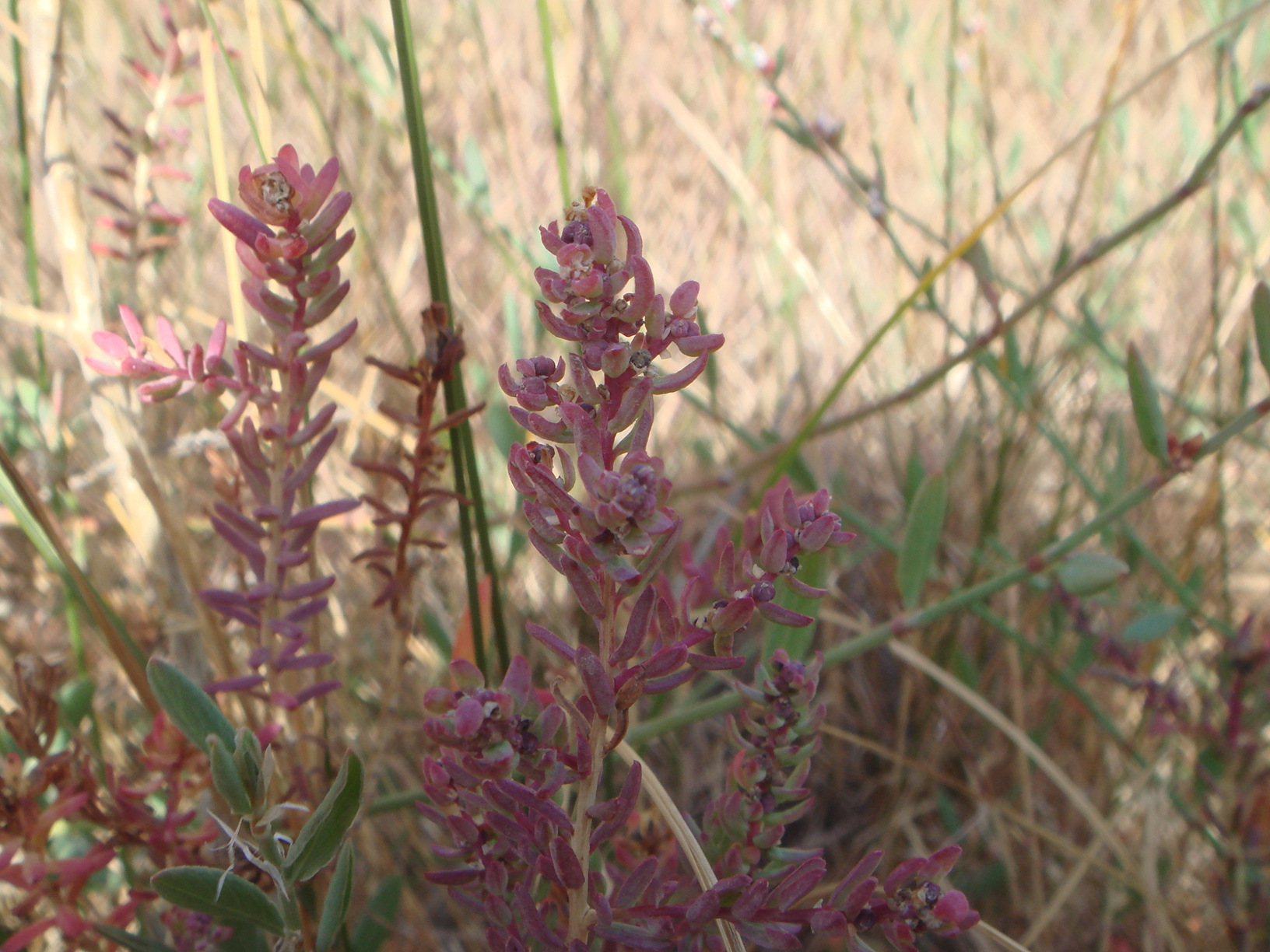 Sosa blanca (Suaeda vera), San Fernando (Cádiz), España.